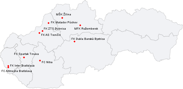 Mapa Corgoň ligy 2005/06